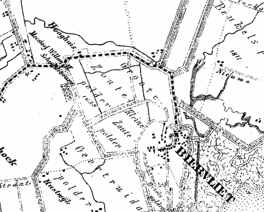 Zoutepolder Biervliet